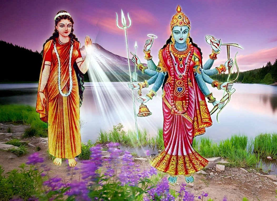 Devi Parvati give birth to Kaushiki Devi